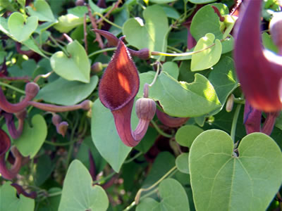 Aristolochia sempervirens